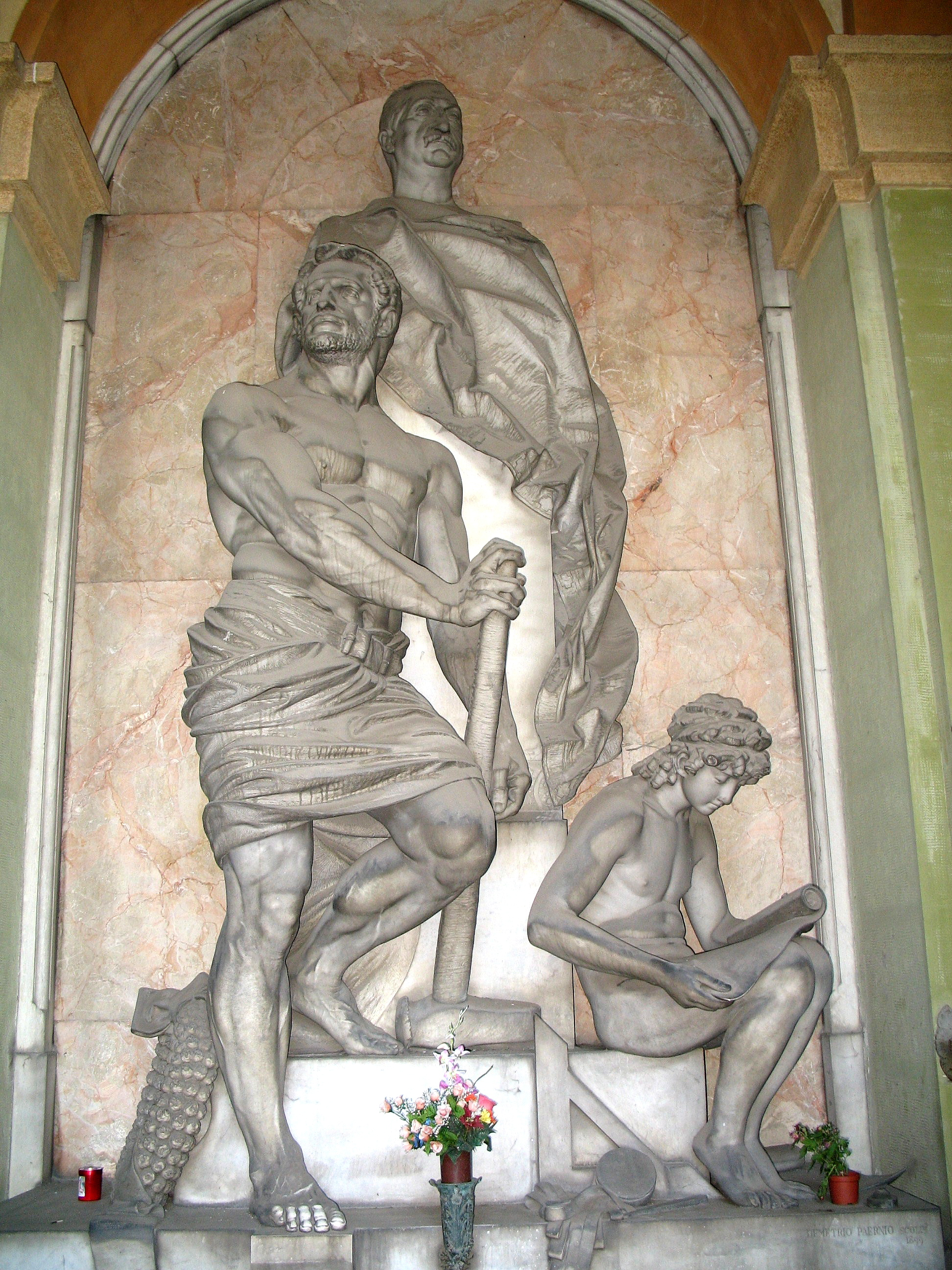 La tomba di Carlo Celesia, opera dello scultore Demetrio Paernio (Genova, 1851-1912) del 1899: un momento "michelangiolesco" dell'artista che precede l'ultima fase simbolista delle tombe Appiani e Lavarello. Si trova a Genova, nel Cimitero monumentale di Staglieno.